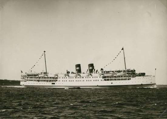 Der auf den Großen Seen eingesetzte Passagierdampfer BOSTON, zusammen mit seinem Schwesterschiff NEW YORK im September 1942 auf dem Nordatlantik durch deutsche U-Boote bei der Überführung versenkt